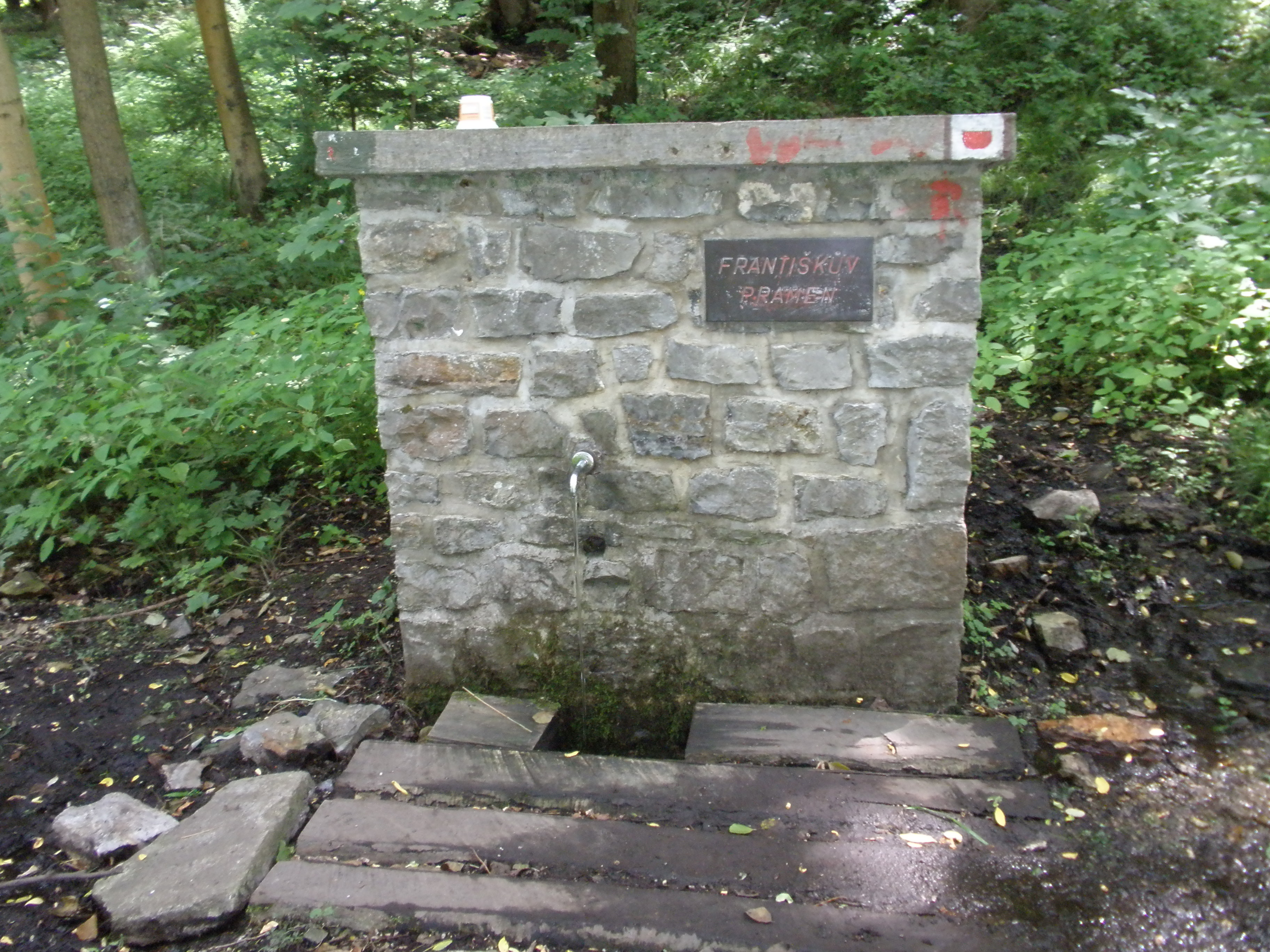 Františkův pramen u vesnice Velká Roudka